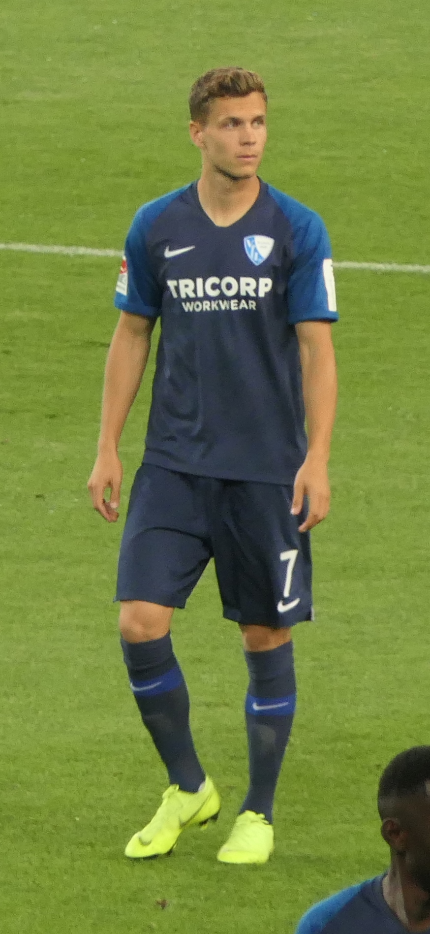 Der Fussballprofi Sebastian Maier im Trikot vom VfL Bochum beim Auswärtsspiel gegen den VfB Stuttgart am 02.09.2019.